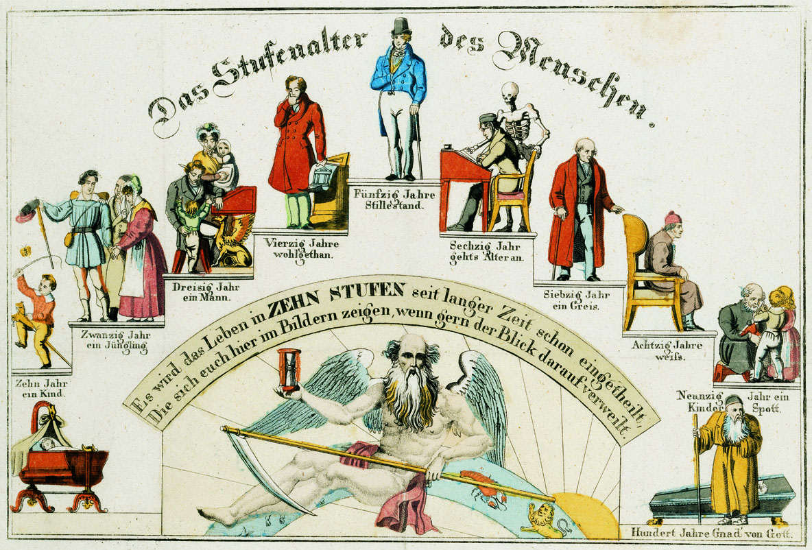 Eine Lebenstreppe aus dem 19. Jahrhundert. Aus dem Westfälischen Landesmuseum für Kunst und Kunstgeschichte, Münster.